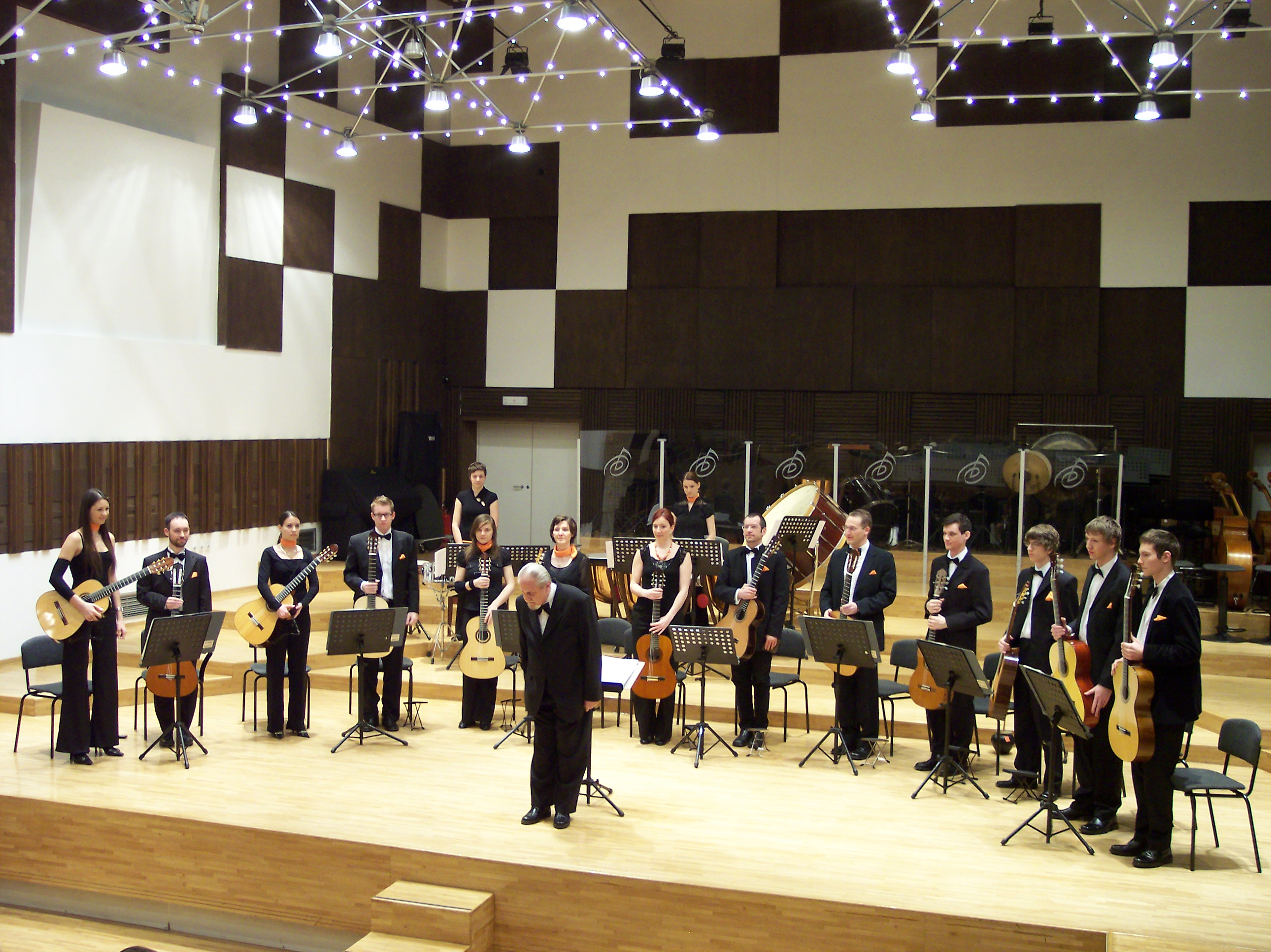 Kitarski orkester Ljudmila Rusa